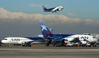 Algunos aviones de la compañía